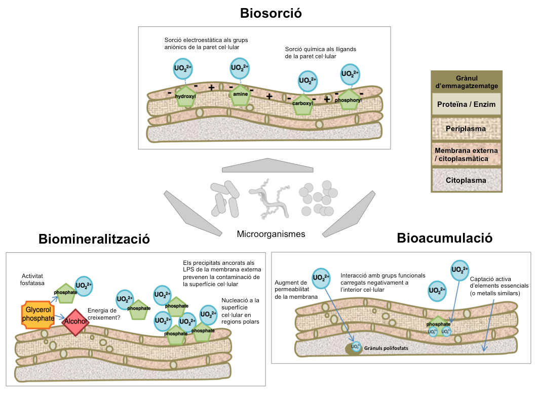 Estratègies de biosorció, biomineralització i bioacumulació per a la bioremediació de residus radioactius.